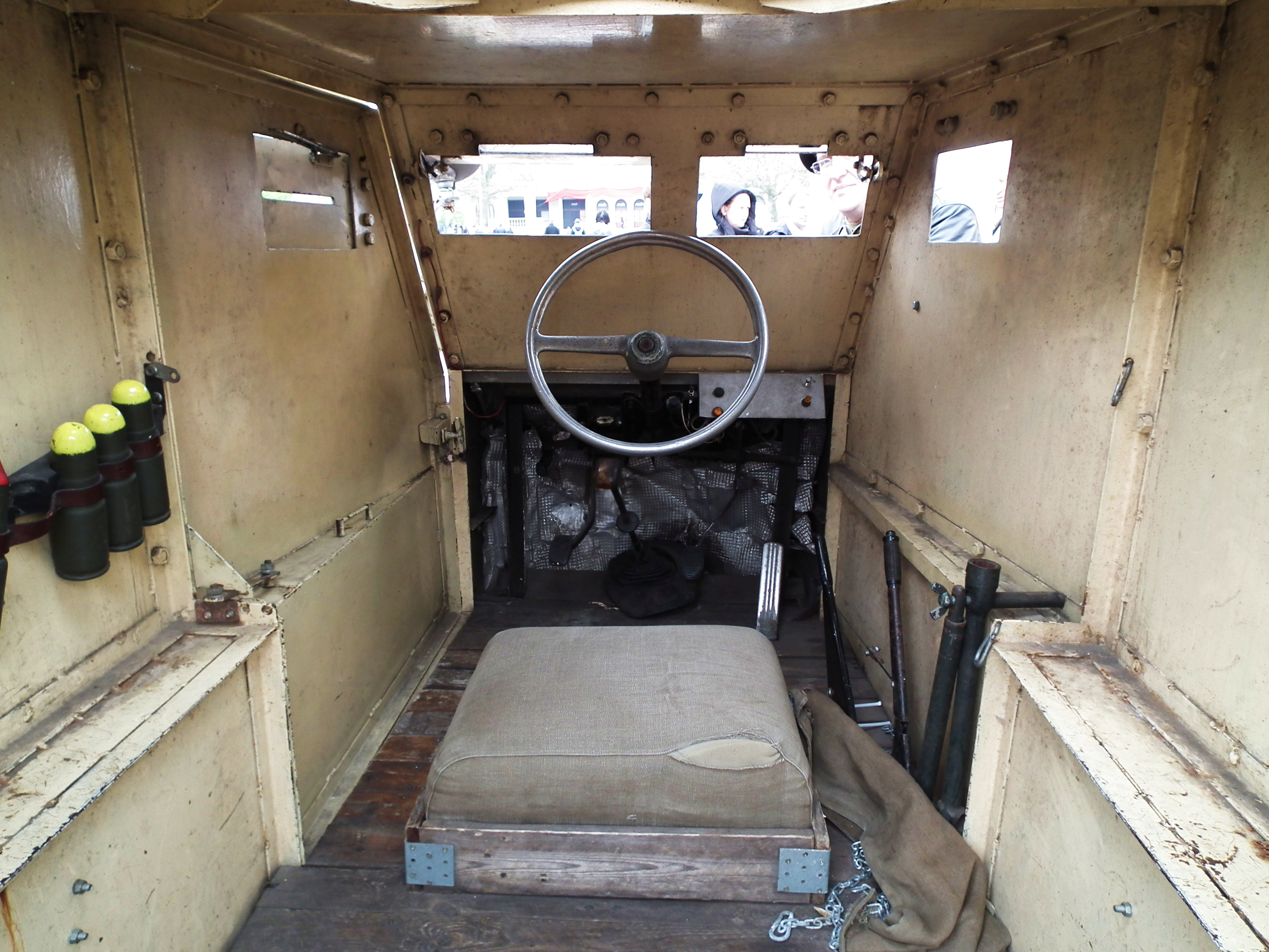 Samochód pancerny wz. 34 w Poznaniu, na Pl. Wolności.